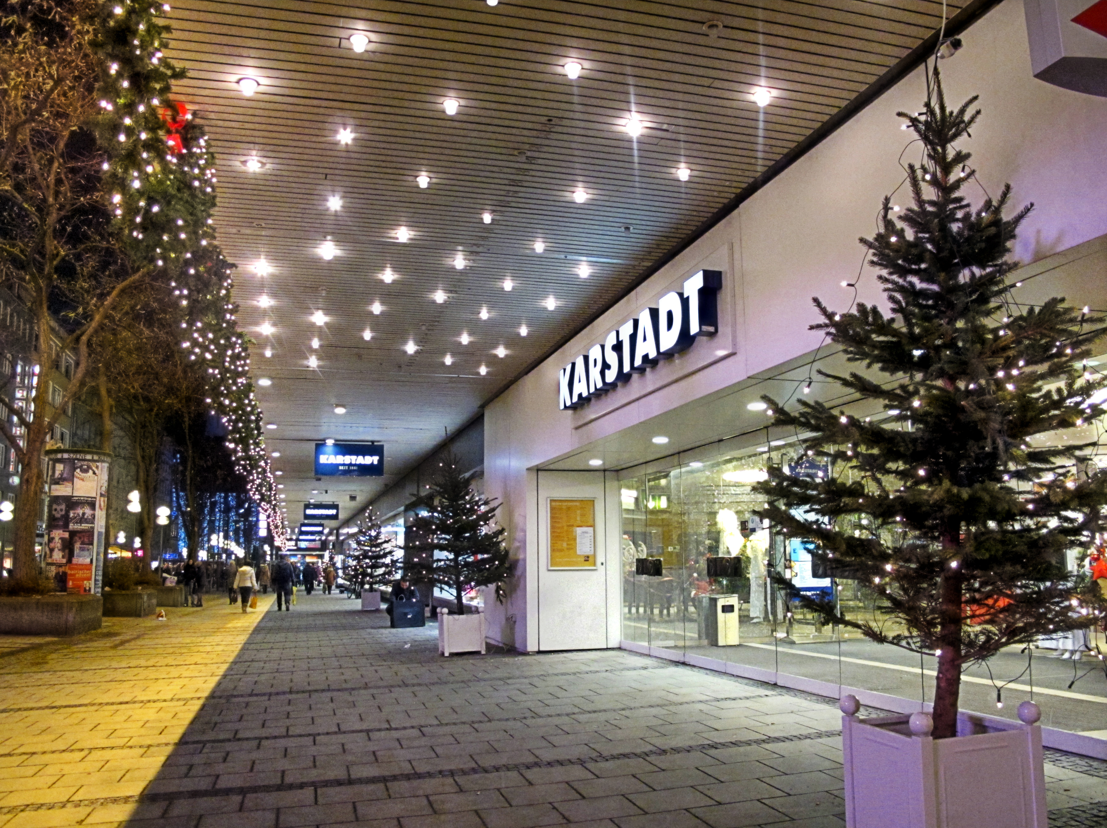 Deutschland, Bayern, München, Karstadt im Weihnachtsschmuck